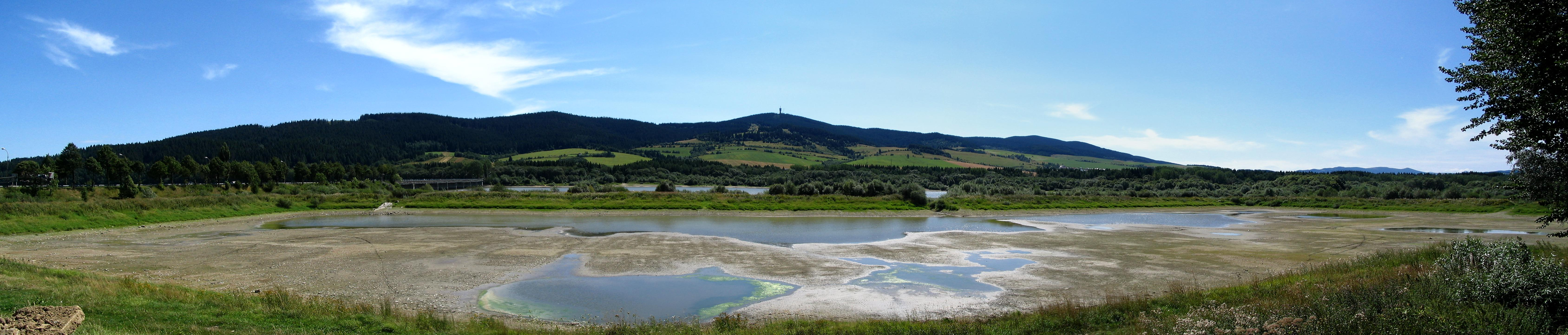 Namestovo, Sloviakia